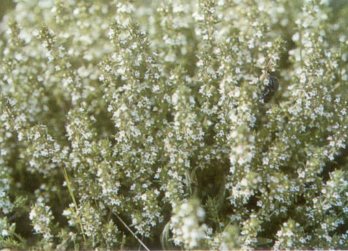 Tomillo albar o salsero